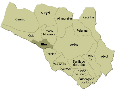 localisation de ilha sur la freguesia de pombal